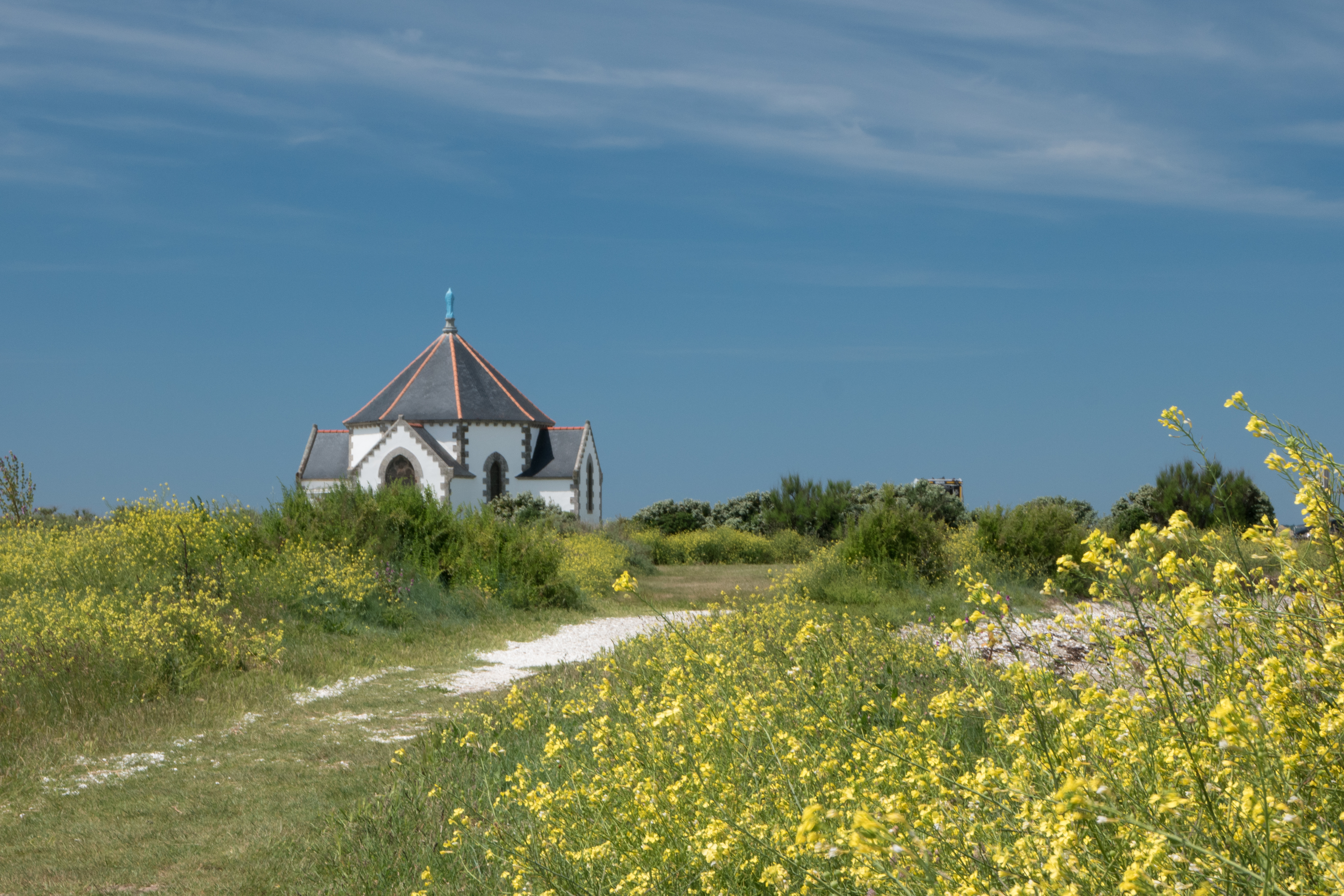 Chapelle Nôtre Dame de la Côte, aussi nomée "Chapelle de Penvins". Située sur la commune de Sarzeau.